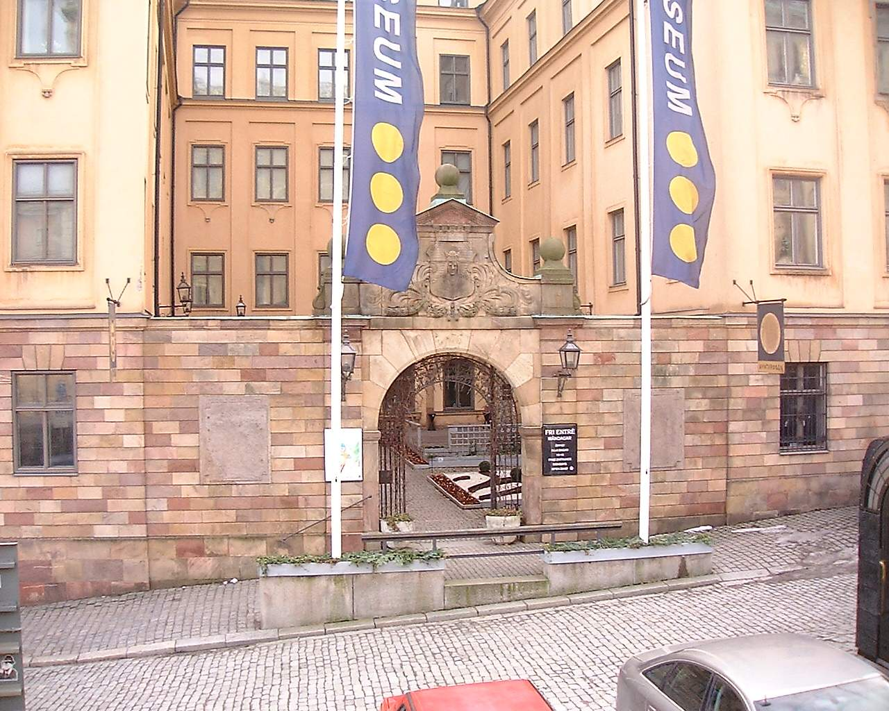 Royal Coin Cabinet at Slottsbacken, Gamla stan, Stockholm.